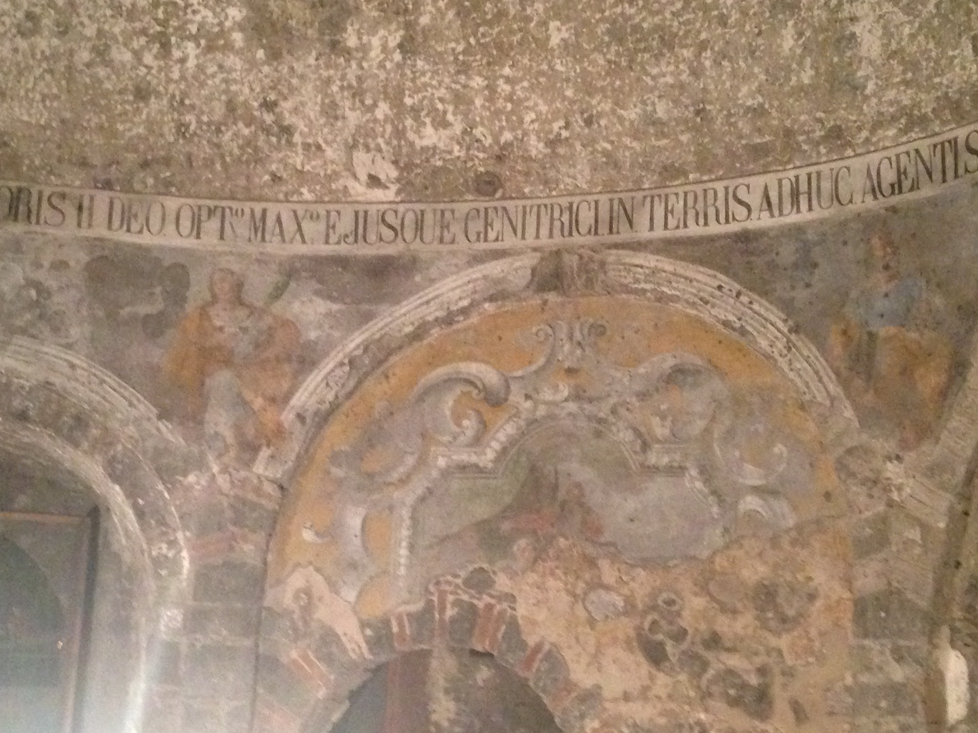 Terme della Rotonda